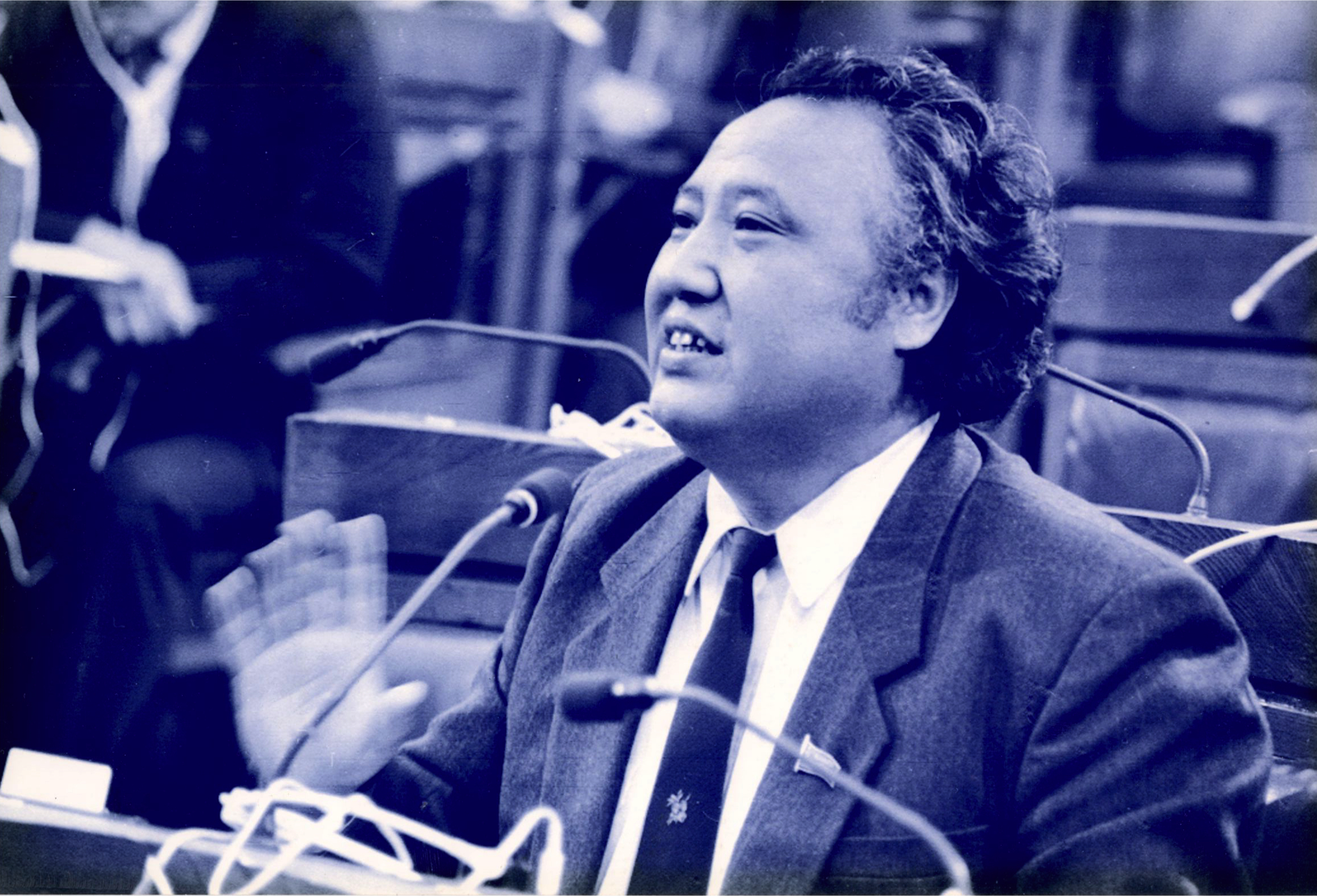 Верховный Совет РК двенадцатего созыва